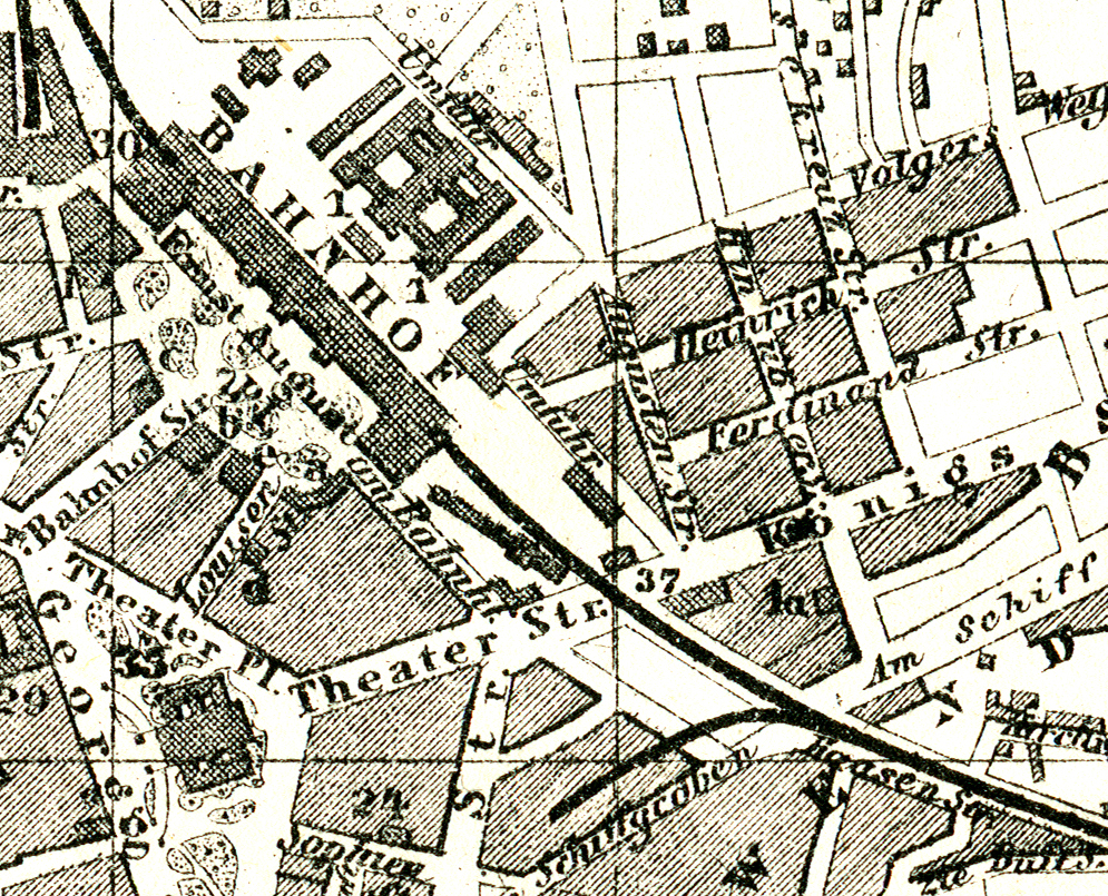 Ausschnitt aus dem Stadtplan von Hannover von 1873, hier mit der Haasenstraße (unten rechts) direkt parallel entlang der innerstädtisch höhergelegten Bahnstrecke Hannover–Altenbeken (dicke dunkle Linie), die nach dem kurzen Abzweiger zum ehemaligen Güterbahnhof Eselswiese weiterführt zum nahegelegenen Hauptbahnhof (oben links) ...